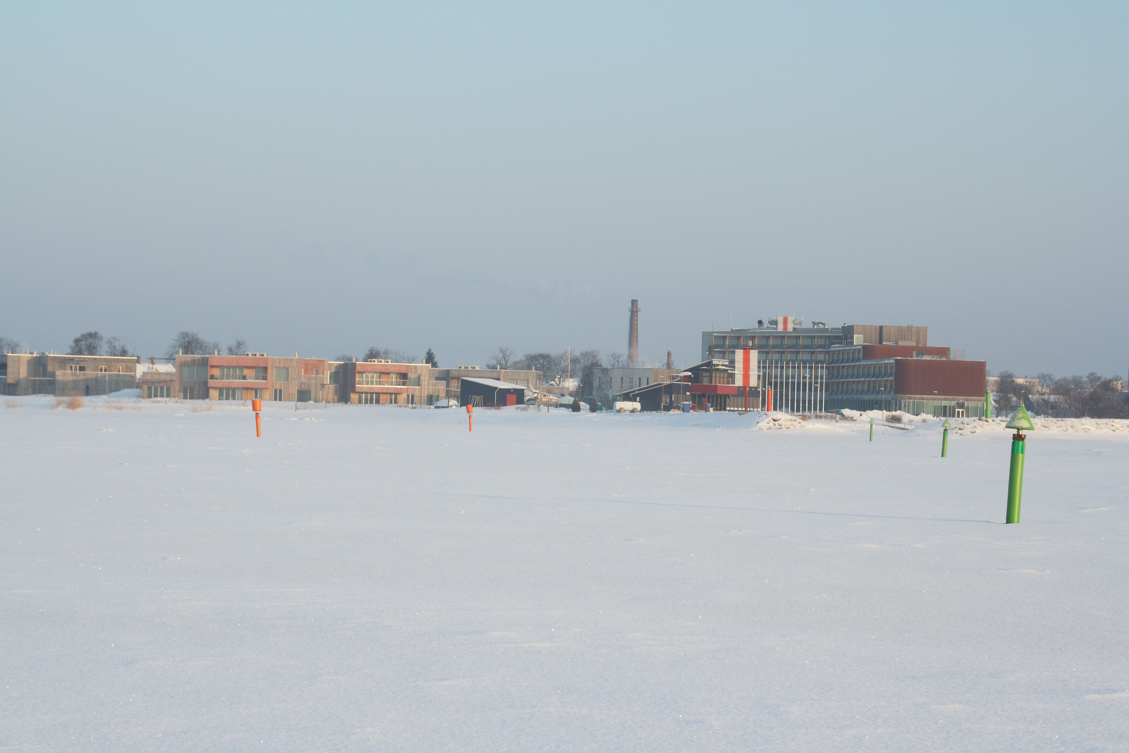 Kuressaare sadam